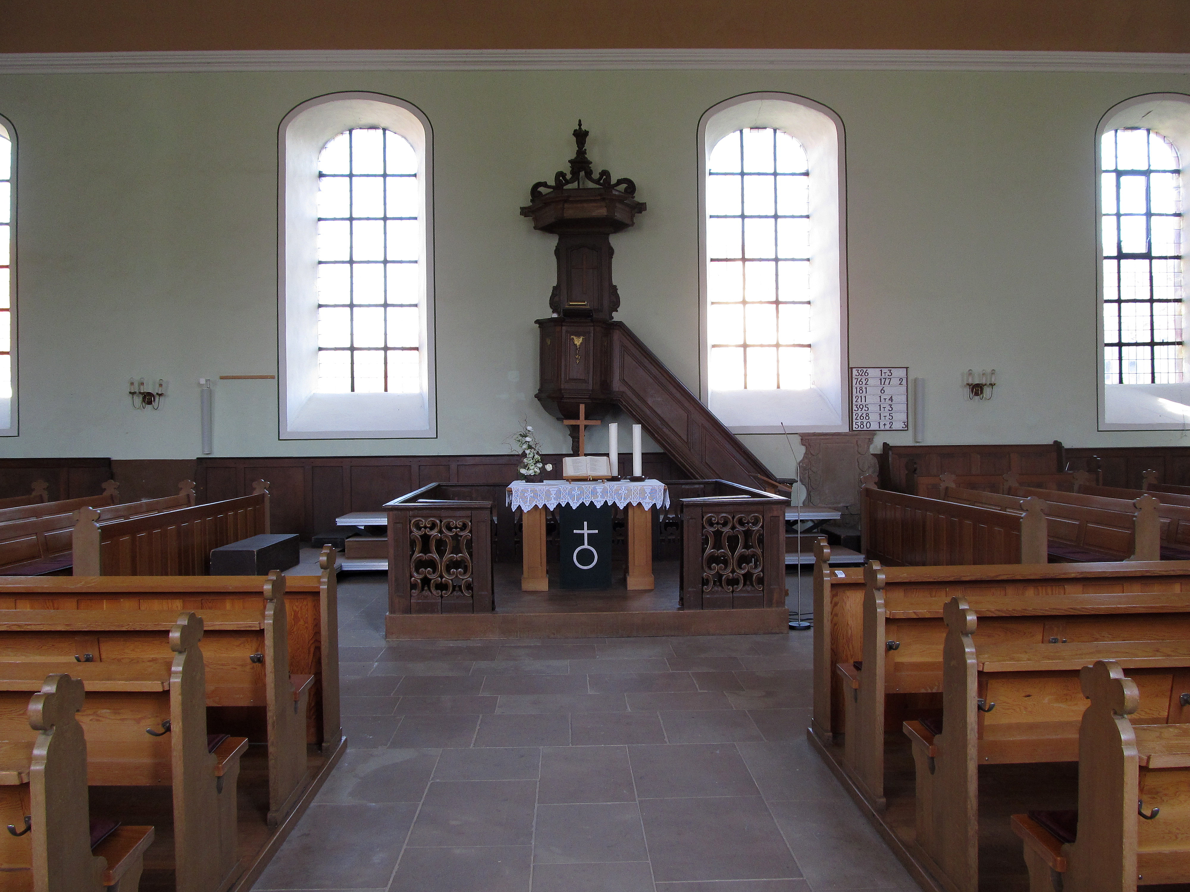 Blick ins Innere der protestantischen Christuskirche in Mimbach, einem Stadtteil von Blieskastel, Saarland